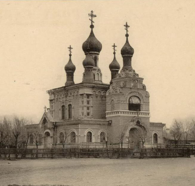 Иверская церковь в Харбине